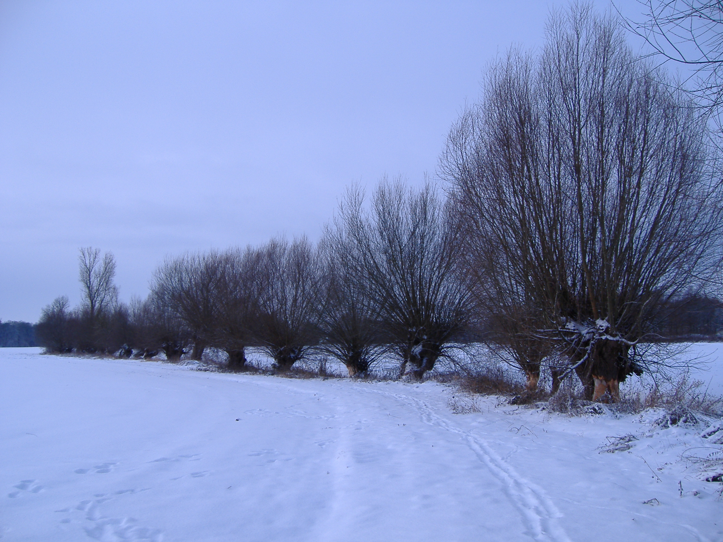 Kopfweiden